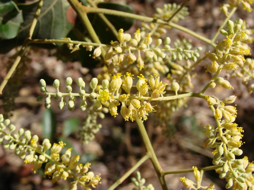 Tachigali subvelutina (Benth.) Oliveira-Filho - tem como bas. Sclerolobium paniculatum var. subvelutinum Benth. - FABACEAE - Parque Ecológico Dom Bosco - Brasília - Distrito Federal - Brasil.